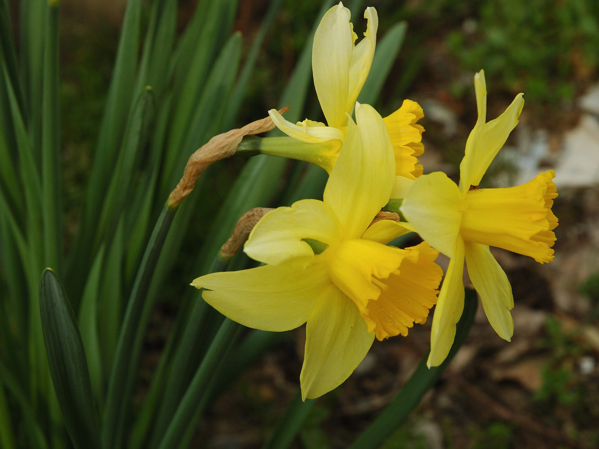 Narcissus (Narcissi,スイセン)